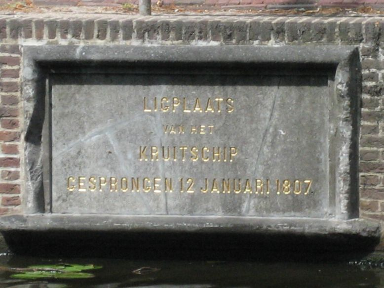 Placa que señala el lugar donde se encontraba amarrado un barco que cargaba pólvora y explotó. Está situada en el Steenschuur, en el centro de Leiden (Países Bajos), a un lado del canal, frente al Van der Werfpark. El texto de la placa, traducido al castellano, dice: "Amarradero del barco de pólvora que estalló el 12 de enero de 1807". Foto tomada por Enrique Boira Freire (usuario Enboifre), el 15 de julio del 2006. Plaque indicating the place where a boat loaded with gunpowder was moored and exploded. It's situated at the Steenschuur, in the center of Leiden (The Netherlands), on one side of the canal, in front of the Van der Werfpark. The text on the plaque, translated into English, says: "Berth of the gunpowder ship that exploded 12 January 1807". Picture taken by Enrique Boira Freire (user Enboifre), on the 15th of July, 2006.